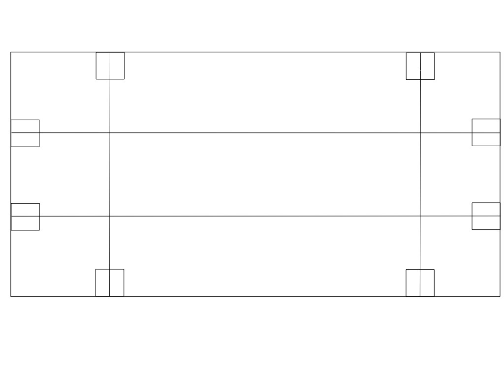 Aspecto de la mesa de billar para el juego de los cuadros 47/2 y 47/1